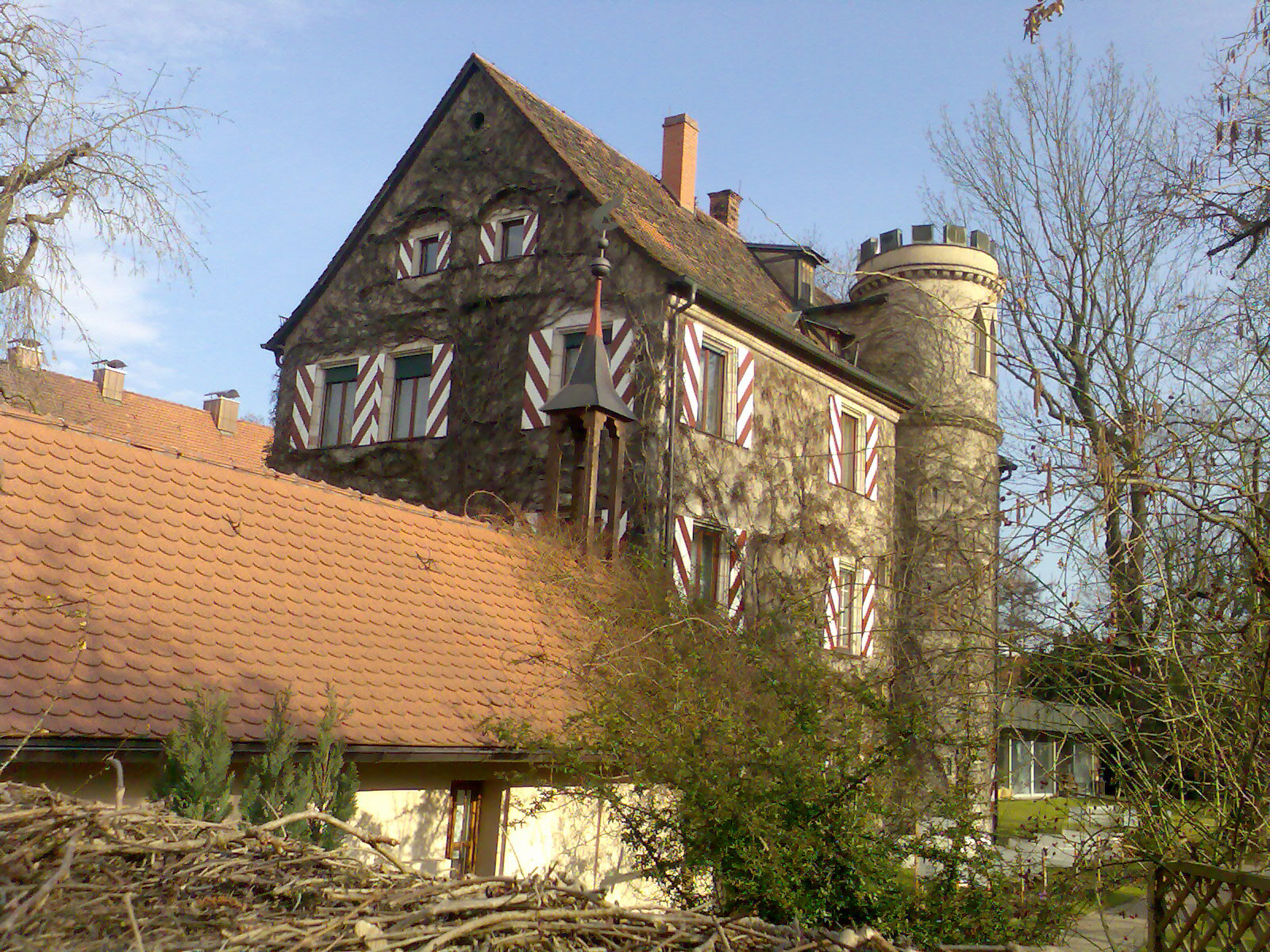 Herrensitz Weigelshof - von Nordwest, Nürnberg, Oedenberger Straße 52, 54